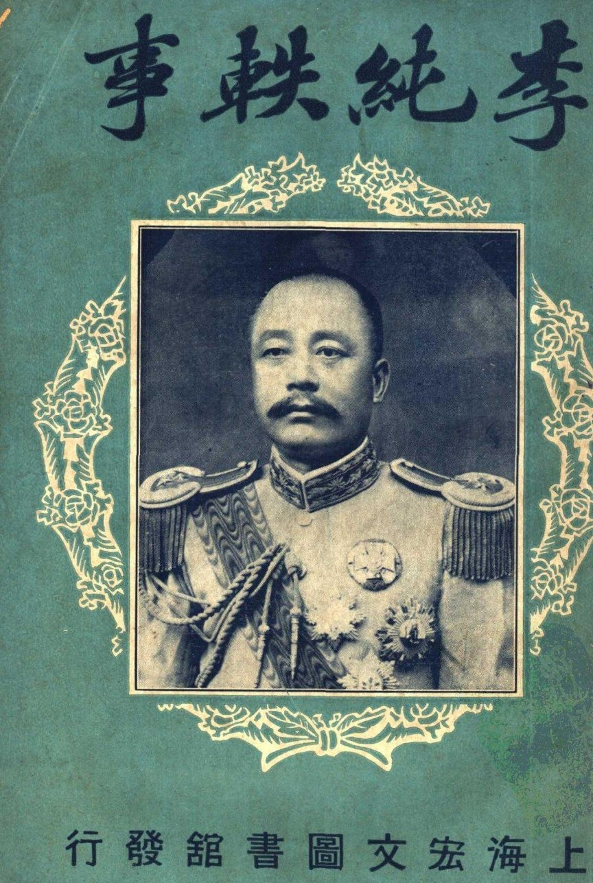 李純 肖像